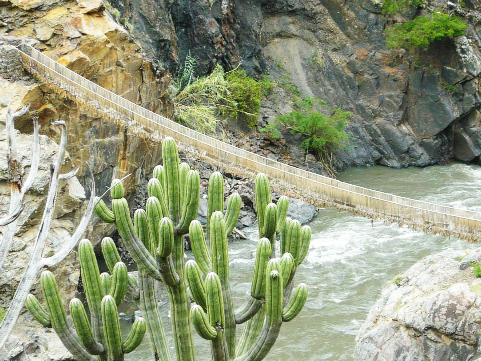 Puente inca sobre el río Yanamayo en el sector Pukayaku, perteneció al ramal andino principal del camino inca que recorría toda la sierra oriental ancashina